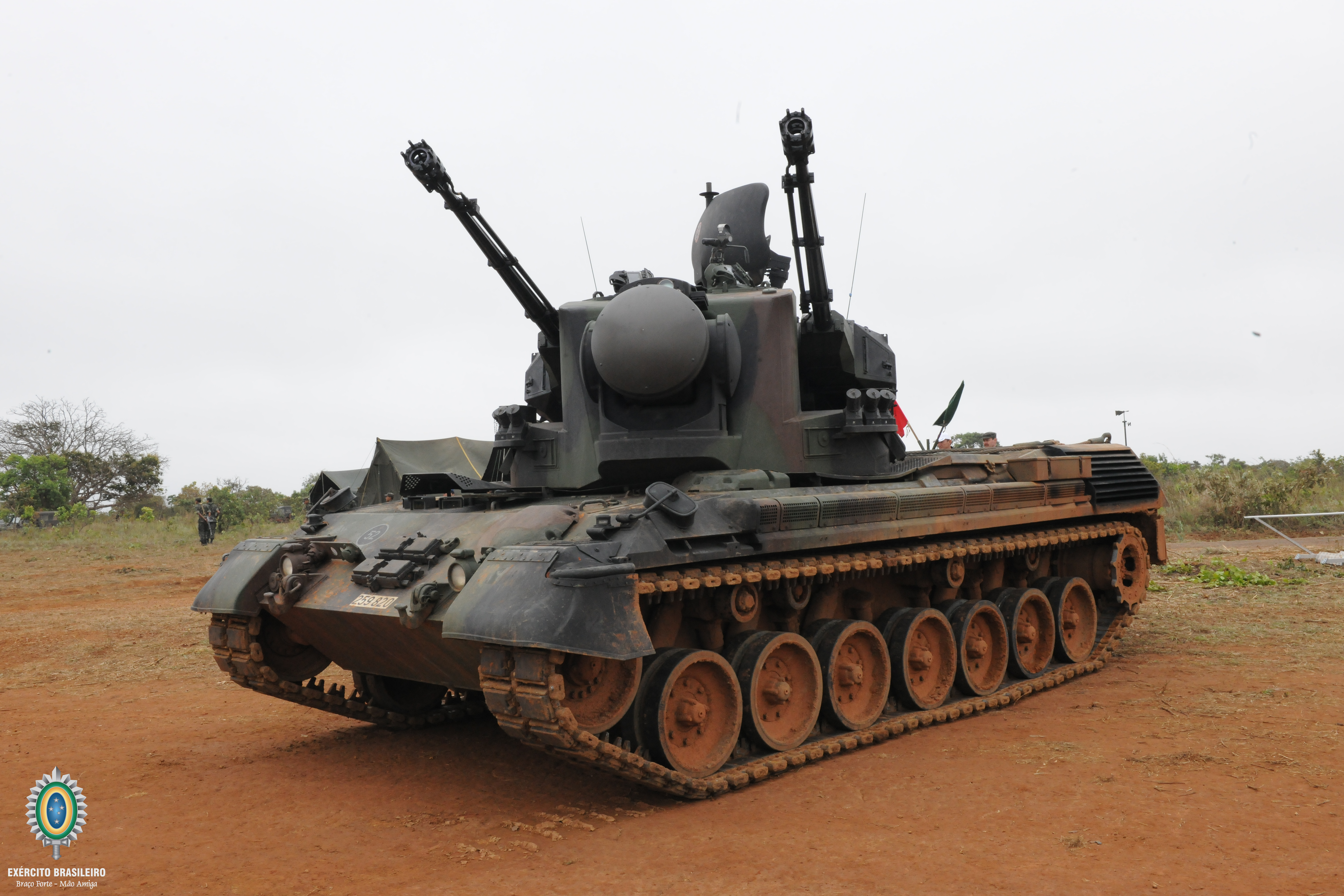 Cavalaria